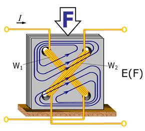 Magnetoanisotroopne muundur, millele on rakendatud jõuvektor F